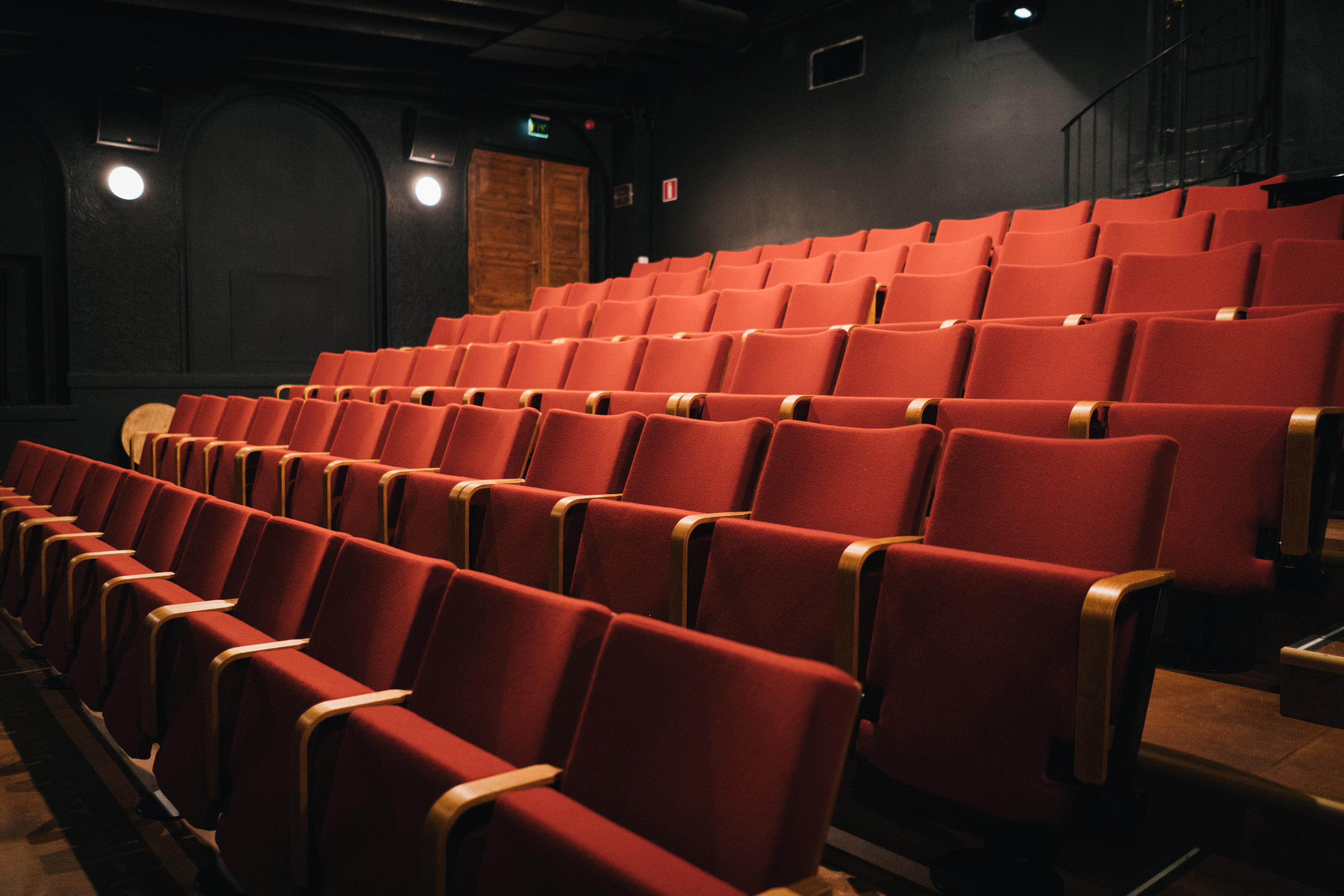 WHS Teatteri Unionin katsomo